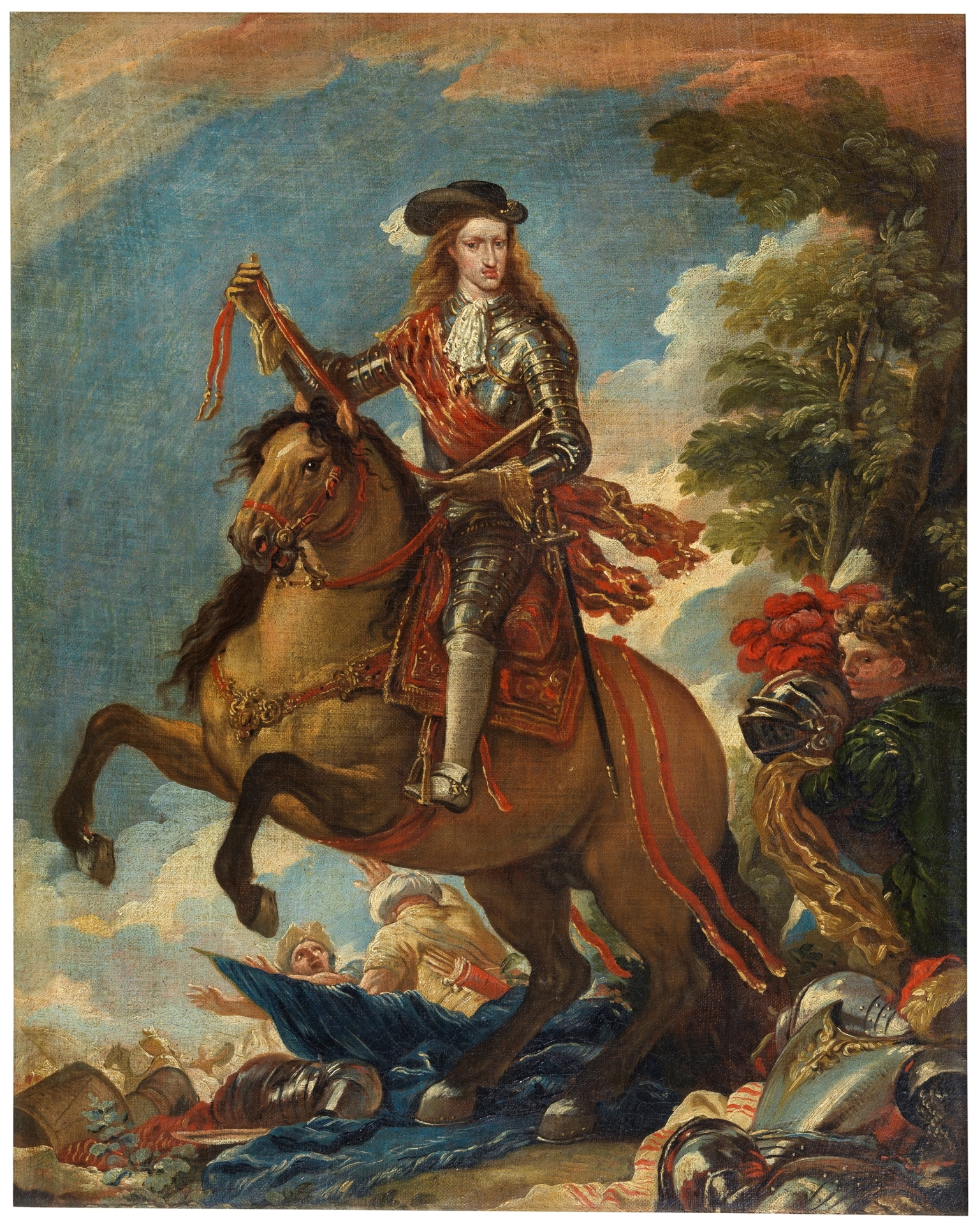 La obra muestra al rey Carlos II de España a caballo.